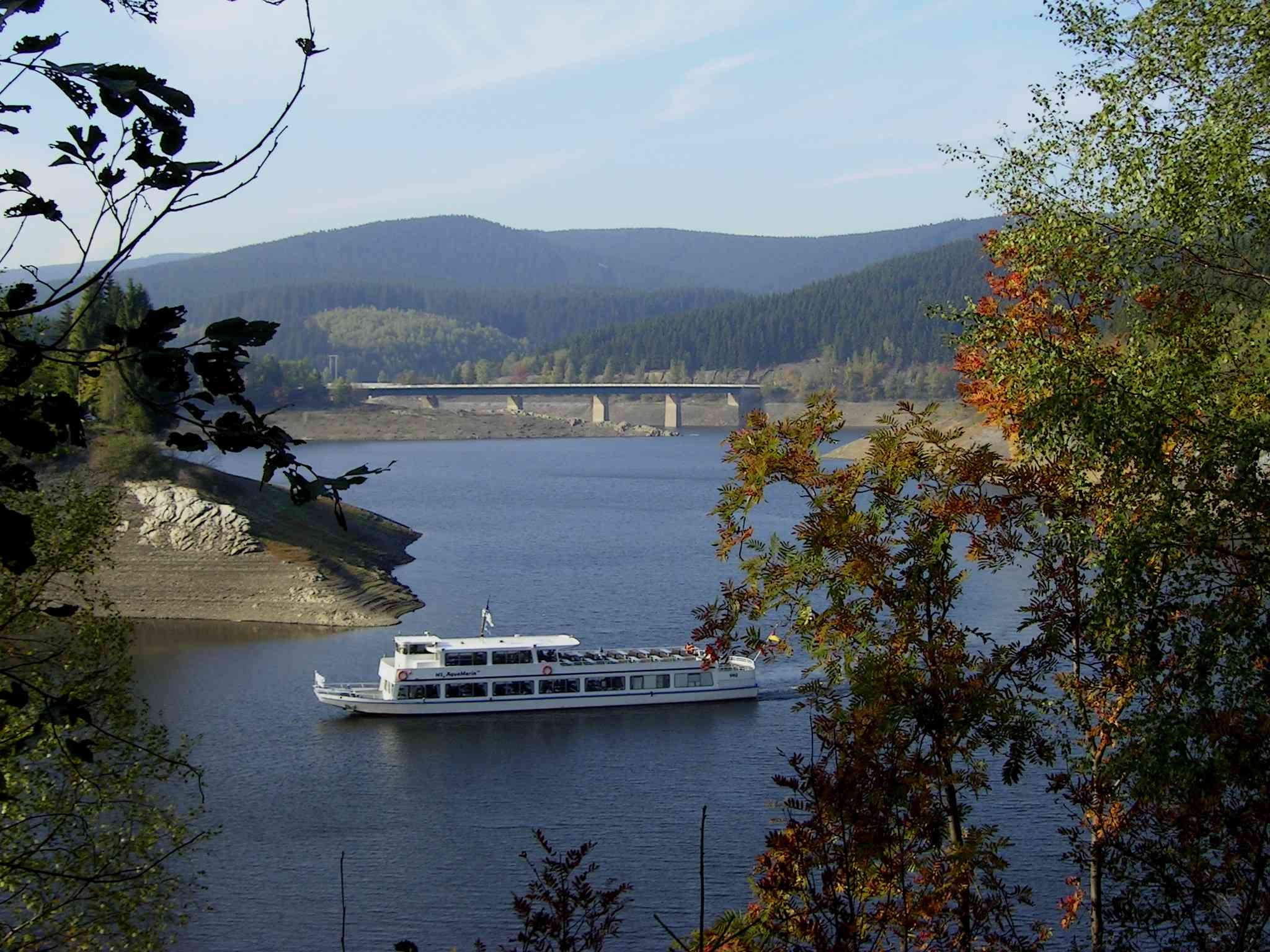 Okertalsperre mit Blick auf die Weißwasserbrücke